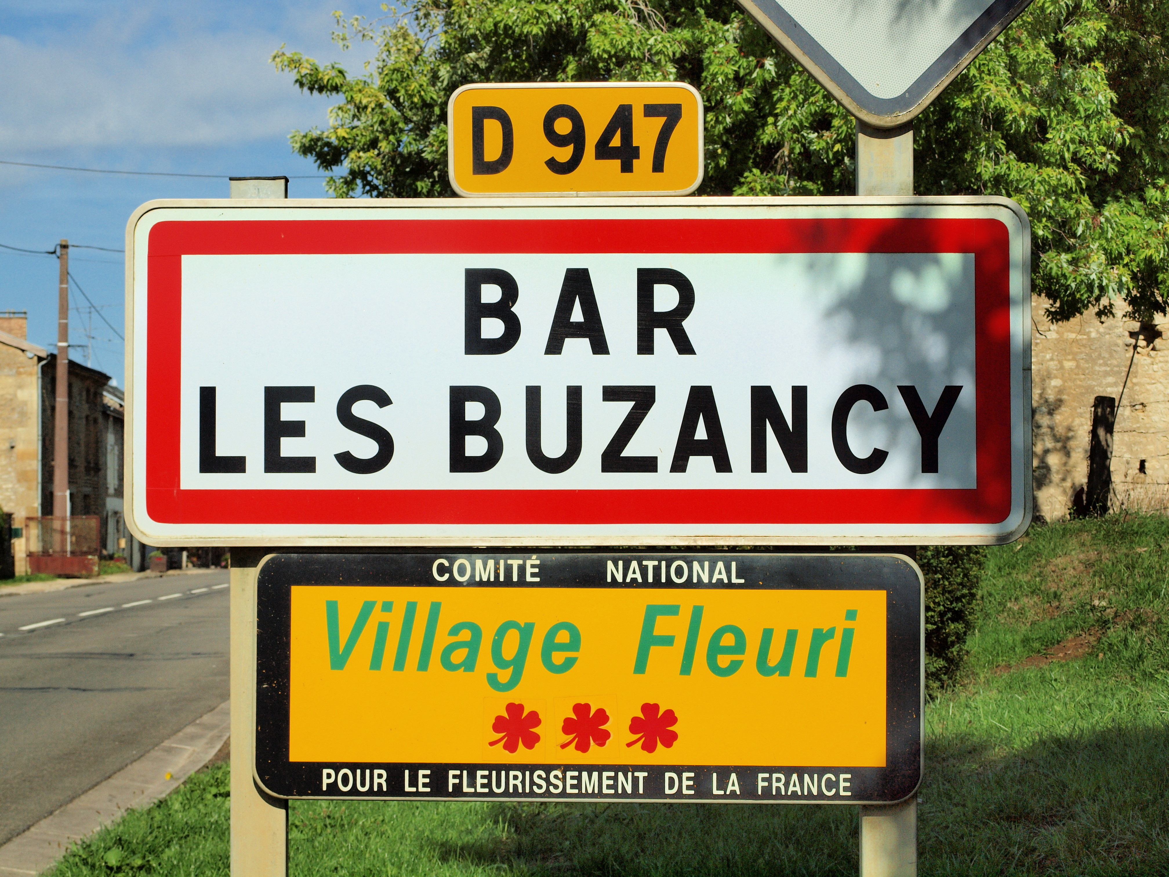 Bar-lès-Buzancy (Ardennes, France)